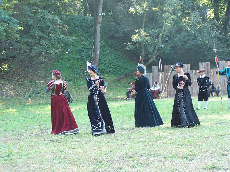 Dębno, Turniej Rycerski 2006.